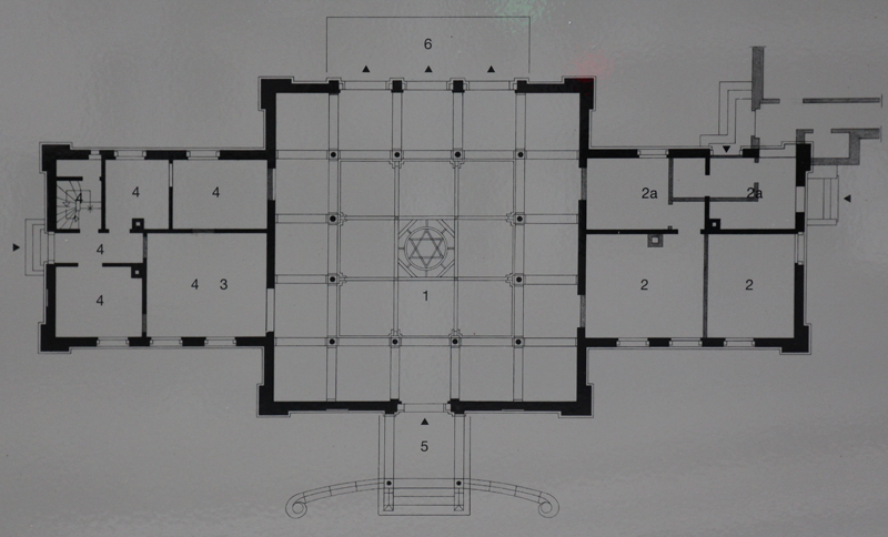 Die Zeichnung zeigt die Grundrisssituation von 1881. Daraus ist zu ersehen, dass sich damals östlich der von 12 Säulen gestützten Zentralhalle der Totenwaschraum befand und westlich davon der Friedhofsaufseher wohnte. Heute befindet sich in diesem Bereich der Totenwaschraum, während der östliche Gebäudeflügel Wohnzwecken dient. Dort errichtete man 1928 einen Anbau. 1. Zentralhalle 2. Tahararaum (Totenwaschraum) bis 1927, heute Wohnräume 2a) Räume der Chewra Kadischa (Beerdigungsbruderschaft) bis 1927 3. Tahararaum ab 1928 4. Wohnung des Friedhofaufsehers bis 1928 5. Baldachinüberdachte Vorfahrt mit Haupteingang 6. Drei Ausgänge zum Friedhof unter Glasdach Schwarz: Gebäude von 1881 Grau: Veränderungen ab 1928